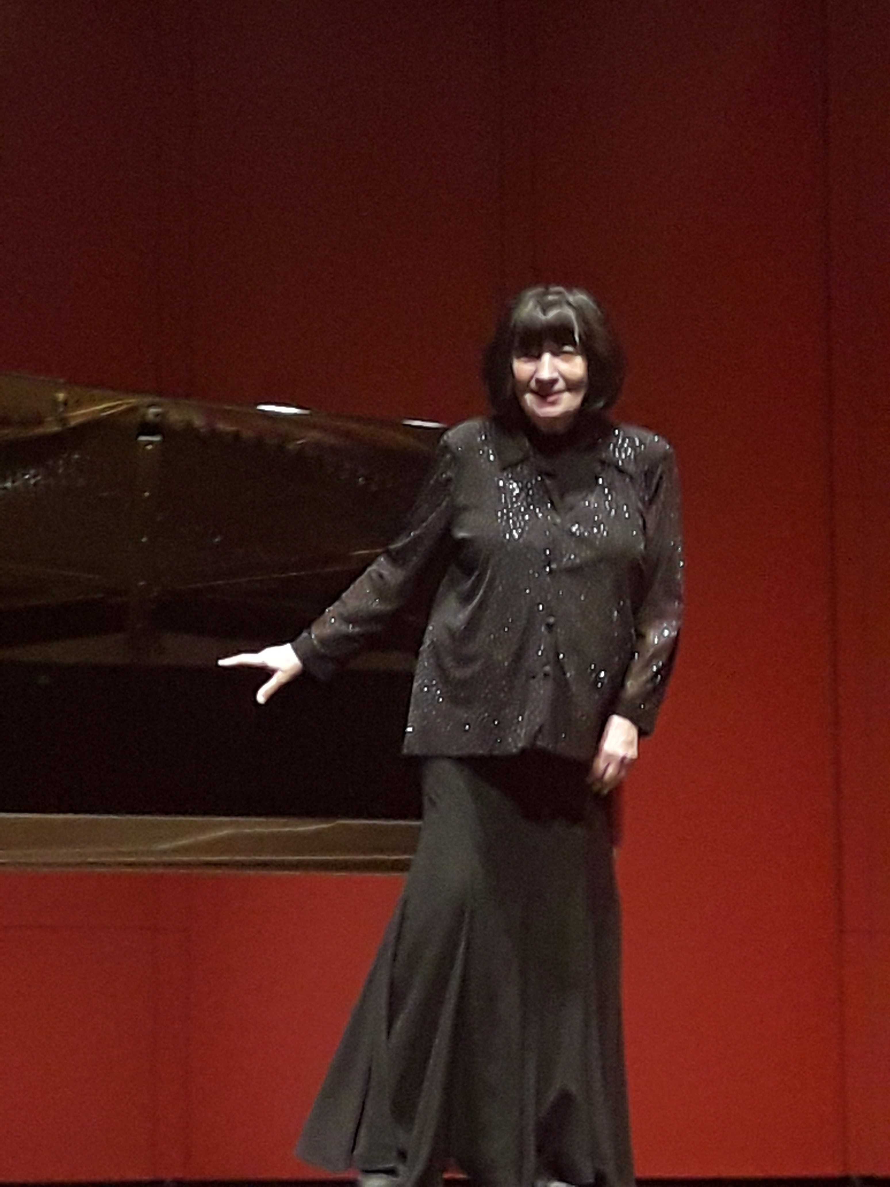 Elisso Virsaladze, pianista de Geòrgia, durant un concert a l'Atlantida de Vic